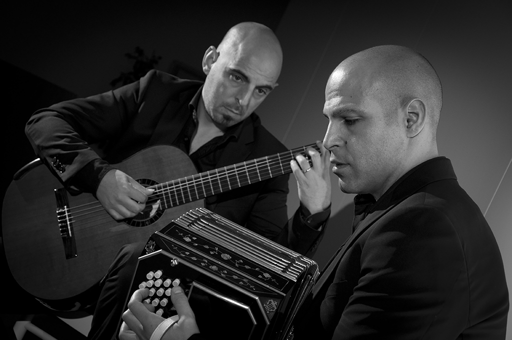 Duo Furia - Deiana in concerto. Fabio Furia, bandoneon Alessandro Deiana, chitarra